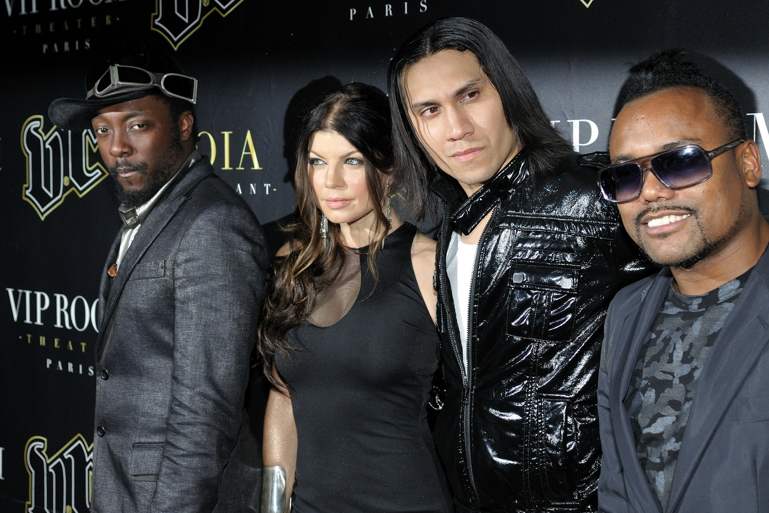 Les Black Eyed Peas en concert privé au VIP Room Paris. avec will.i.am, apl.de.ap, Taboo et Fergie